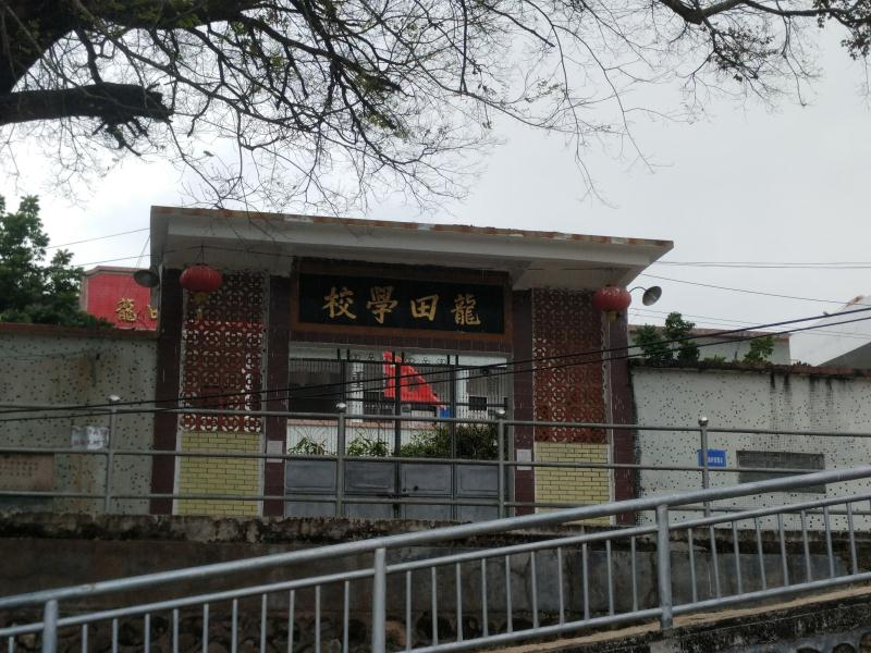 这是丰顺留隍县田坫村的龙田学校。